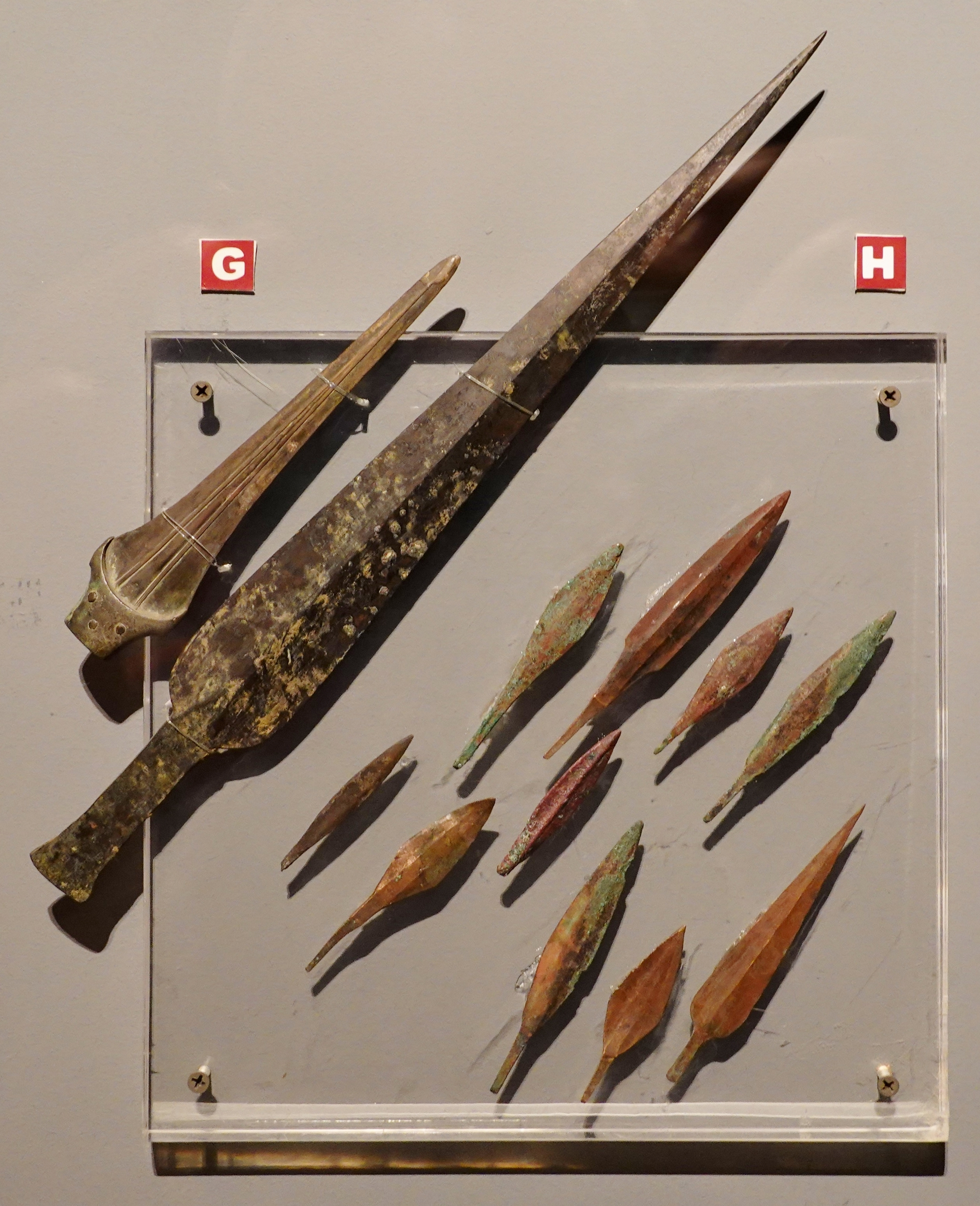 Bronzene Dolchklingen und Pfeilspitzen aus der Zeit des Neuen Reiches, ausgestellt im Luxor-Museum, Ägypten